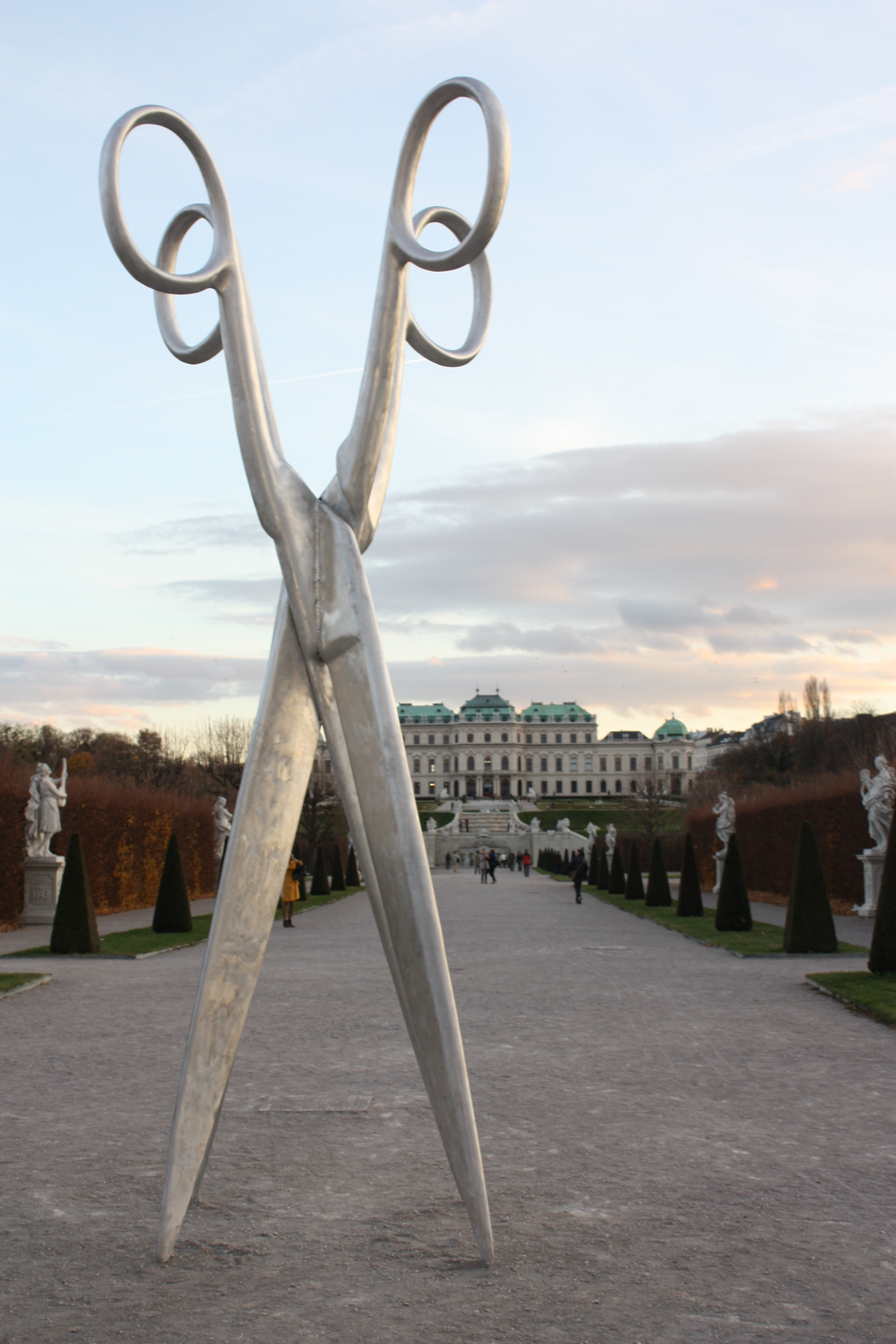 Belvedere. Sculpture by Valie Export.